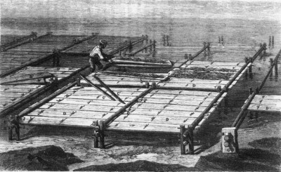 Plancher collecteur de naissains de Ferdinand de Bon, gravure de Vincent Coste (1861).